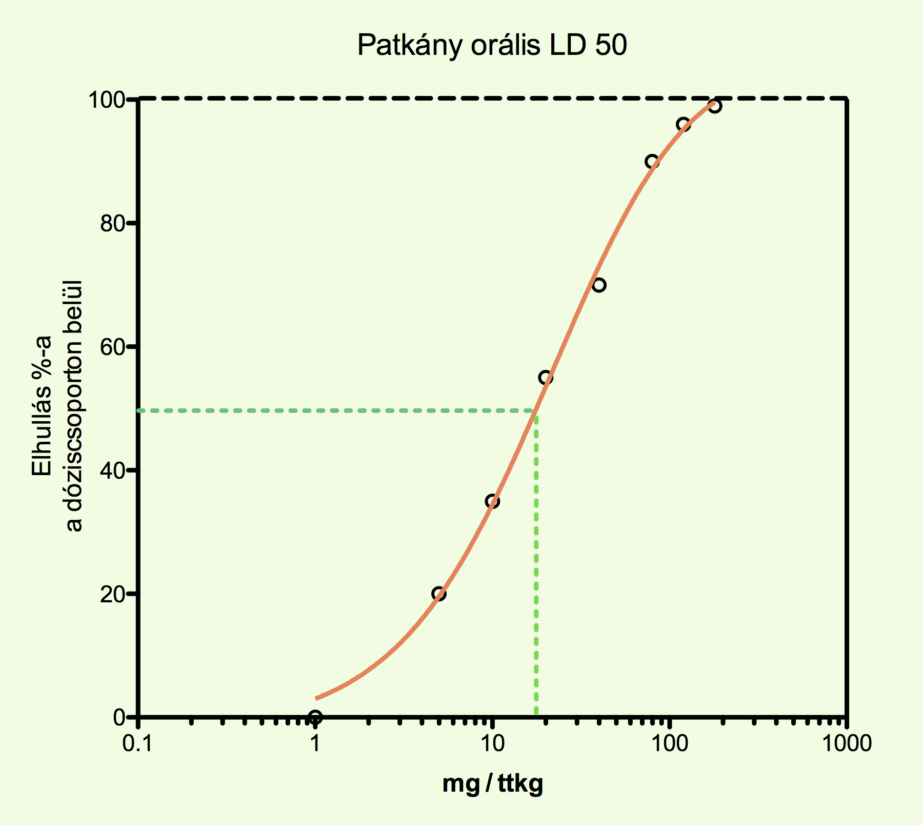 LD50 graph